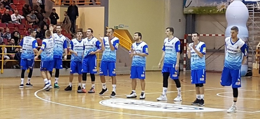 Koszykarze Pogoni Prudnik